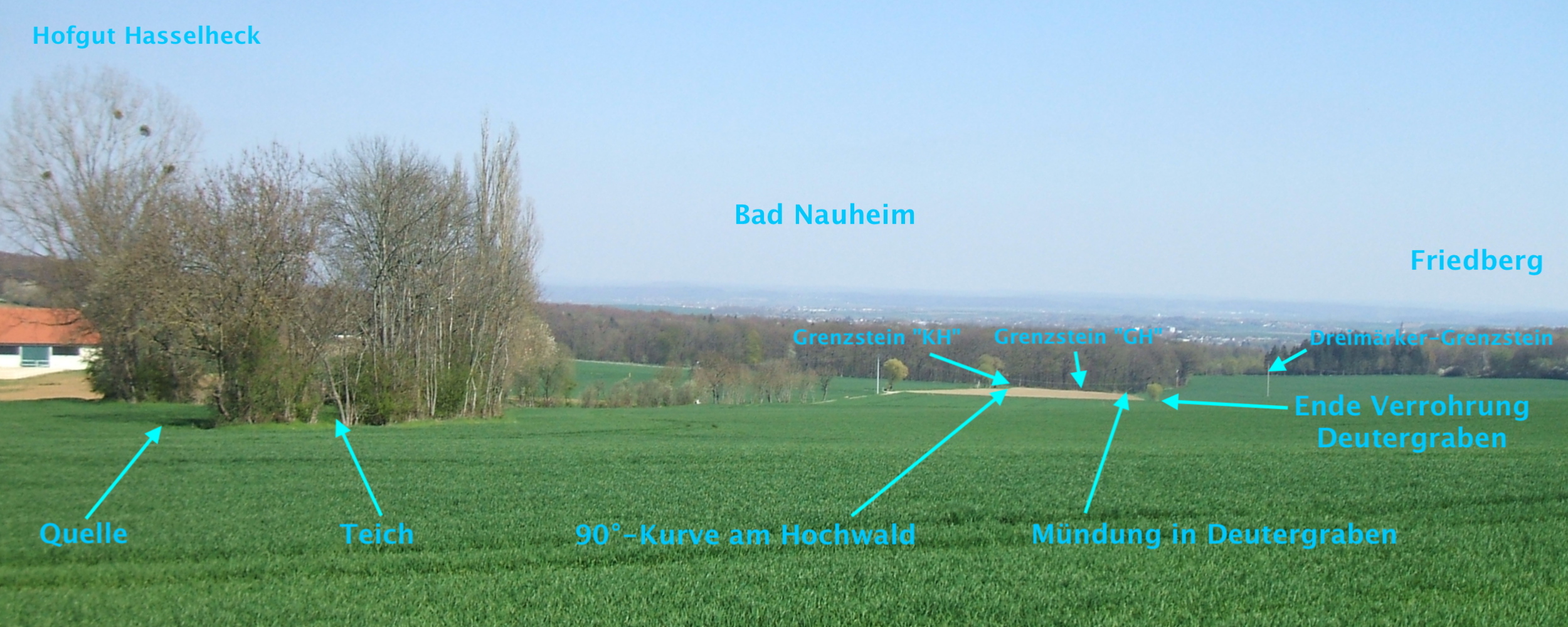 Ansicht des gesamten Verlaufs des Stuhlgrabens von der Quelle bis zu seiner Mündung, ergänzt um die Verortung von Grenzsteinen und Orten